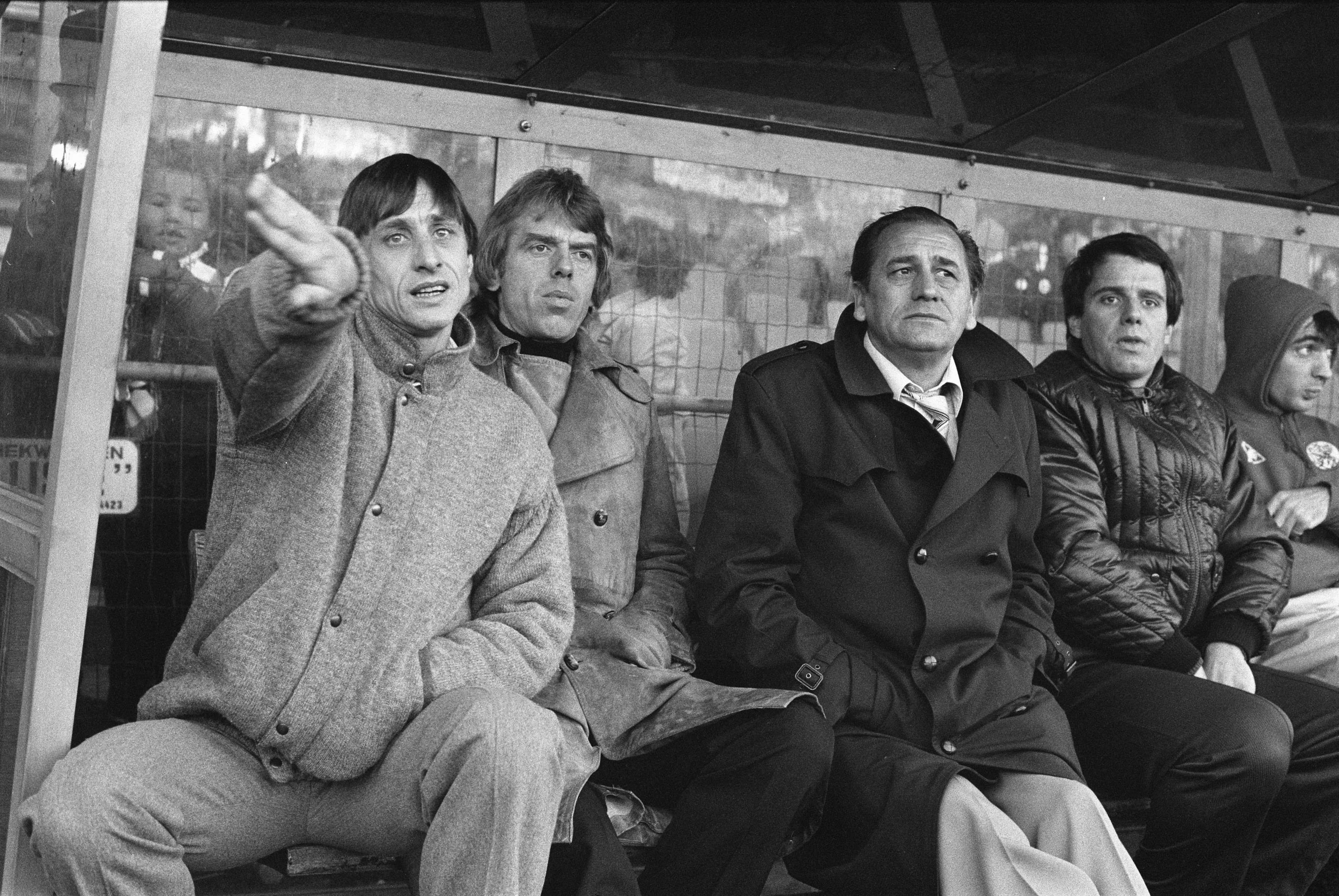 Collectie / Archief : Fotocollectie Anefo Reportage / Serie : [ onbekend ] Beschrijving : Ajax tegen FC Twente 5-3, Johan Cruijff nam in tweede helft plaats naast Leo Beenhakker , hier stuurt hij de Ajax-spelers naar voren Datum : 30 november 1980 Trefwoorden : sport, voetbal Persoonsnaam : Beenhakker, Leo, Cruijff, Johan Instellingsnaam : FC Twente Fotograaf : Bogaerts, Rob / Anefo Auteursrechthebbende : Nationaal Archief Materiaalsoort : Negatief (zwart/wit) Nummer archiefinventaris : bekijk toegang 2.24.01.05 Bestanddeelnummer : 931-1799